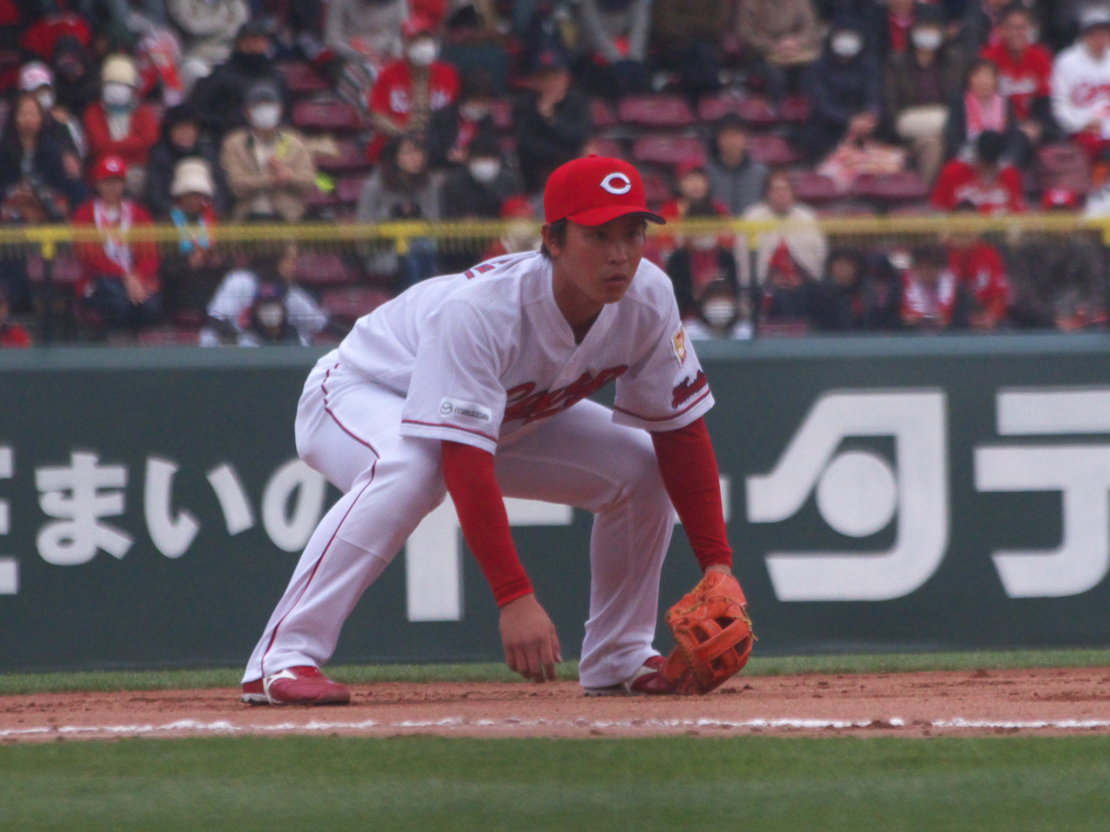 広島東洋カープ堂林翔太